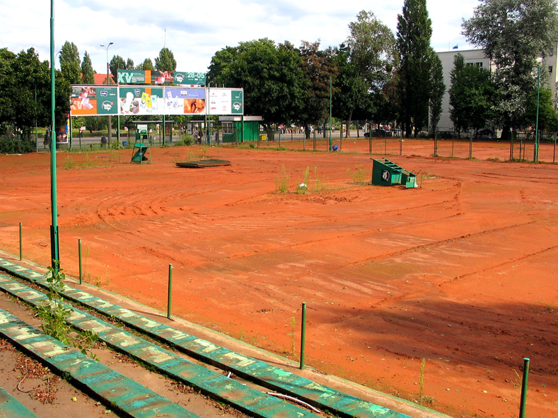 2011 Toruń